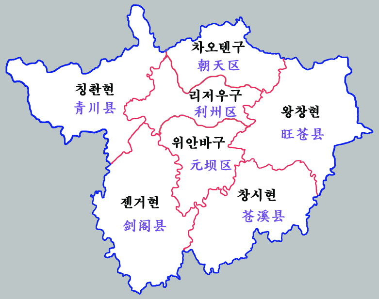 광위안시 현급구역도